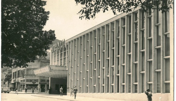 Teatro Olympia durante 1960